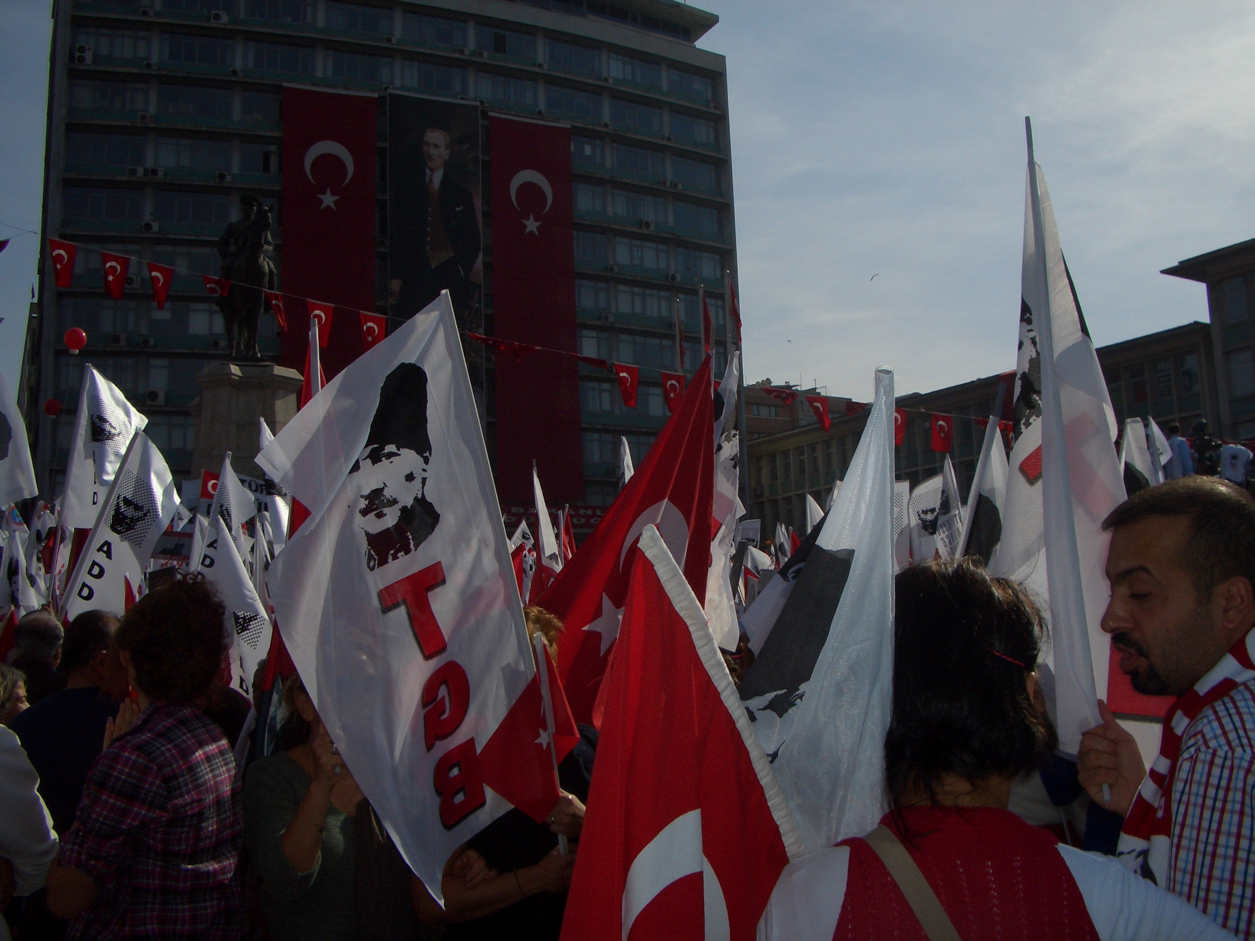 Cumhuriyet için Seferberlik Buluşması